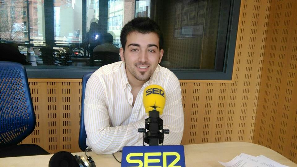 El escritor Alejandro Barrero Santiago en el programa Hoy por hoy, de Carlos Flores.